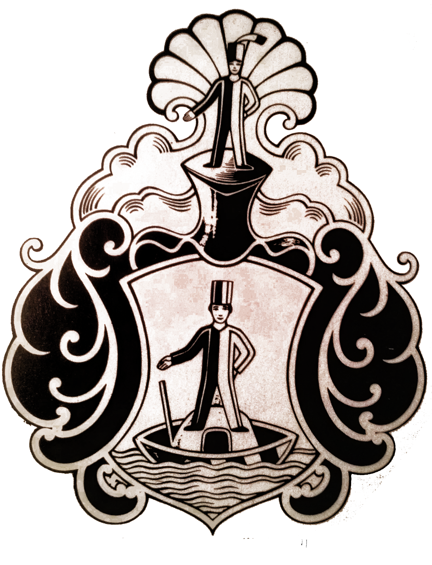 Stammwappen der Standl aus dem 16. Jahrhundert